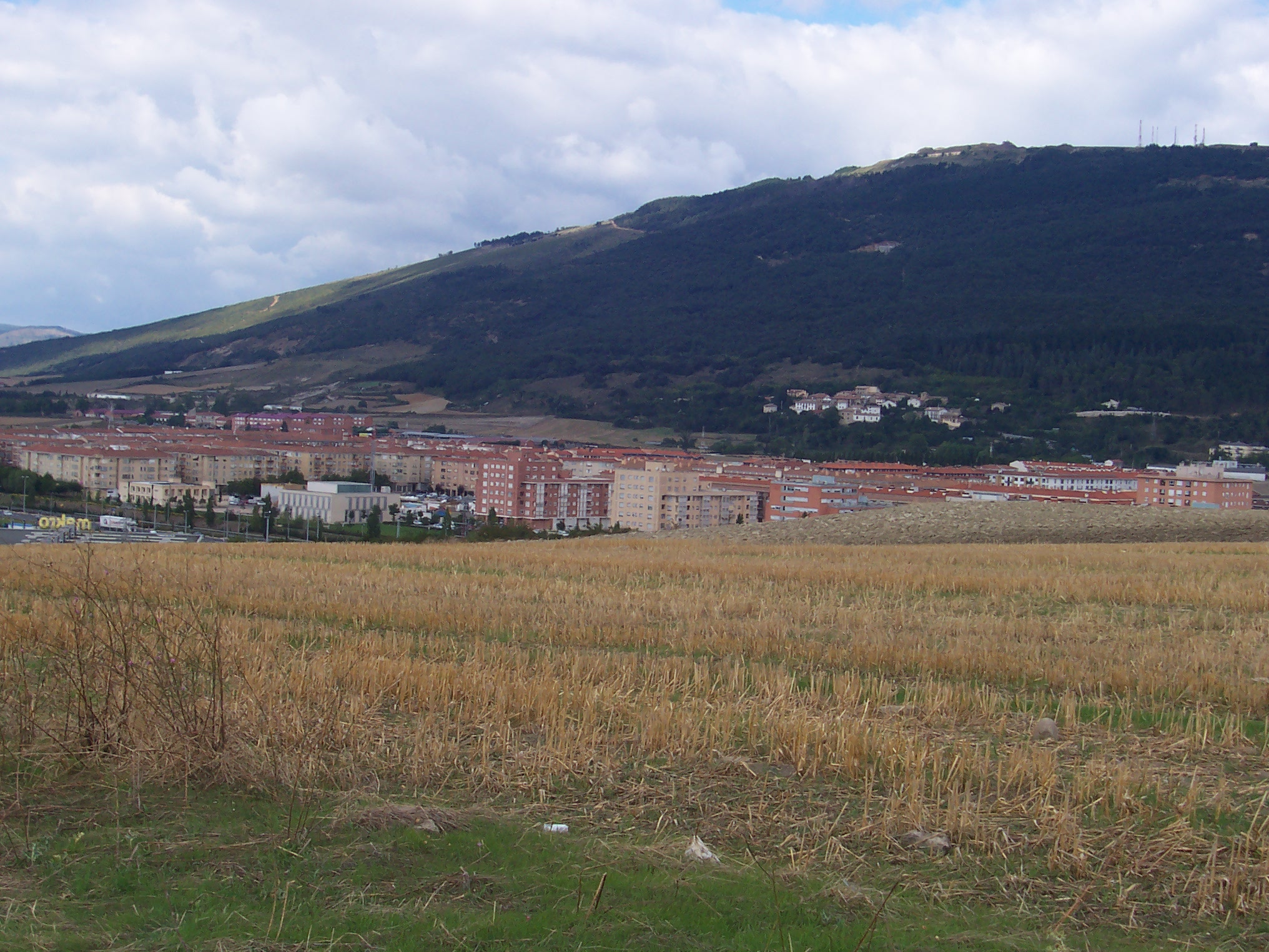 Herria urrutitik ikusia.